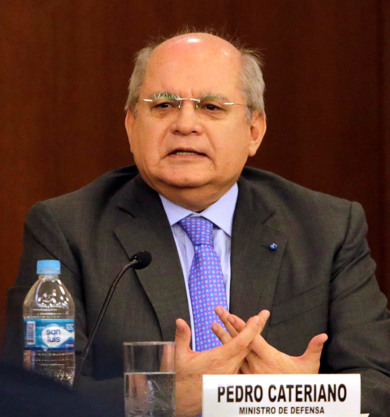 El Banco Central de Reserva del Perú acuñó una moneda conmemorativa por el centenario del nacimiento del Gran General del Aire del Perú y héroe máximo de la Fuerza Aérea, José Abelardo Quiñones. El ministro de Defensa, Pedro Cateriano, participó en la presentación de la moneda de colección junto al presidente del BCR, Julio Velarde, y del comandante general de la FAP, General Jaime Figueroa Olivos.